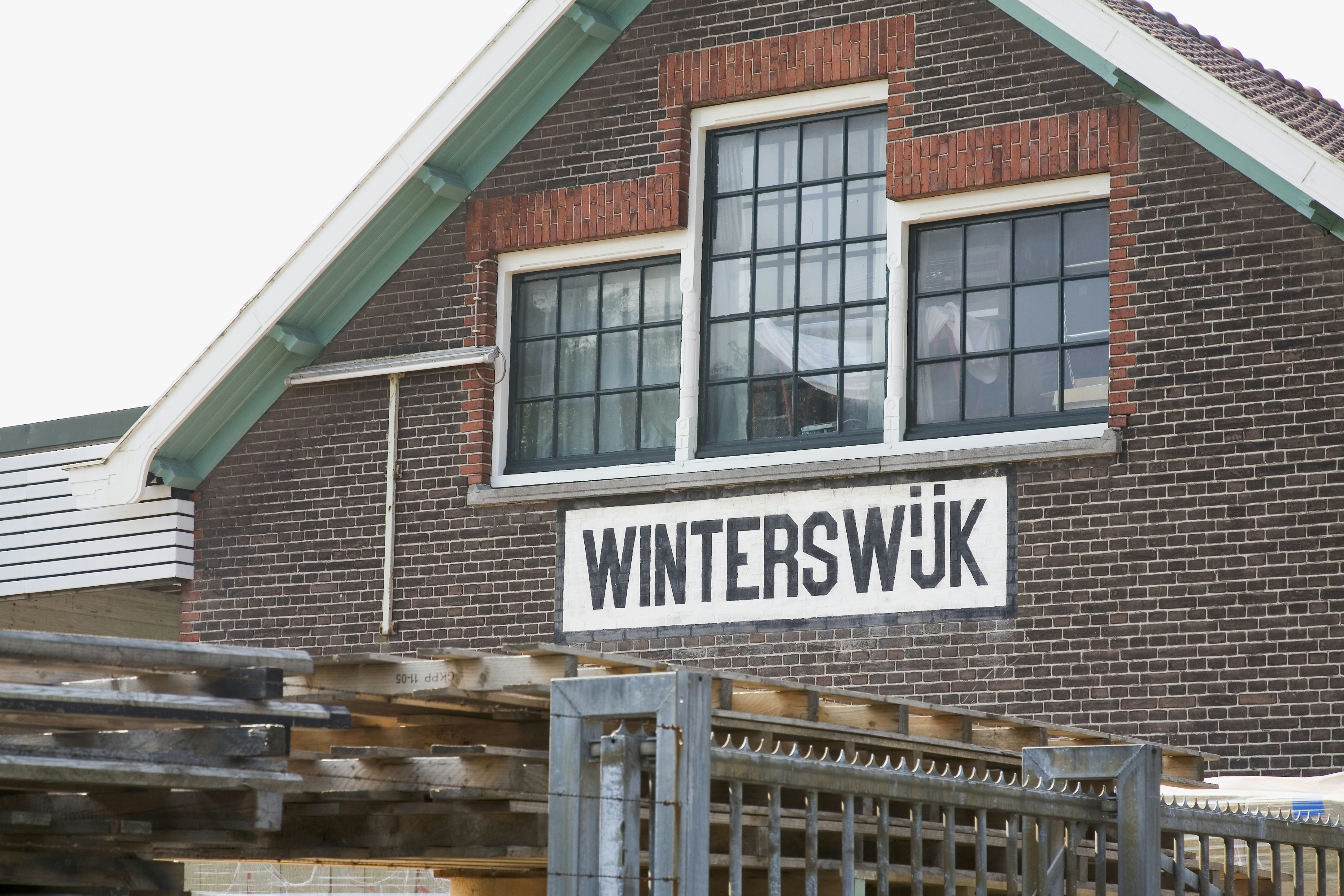 Voormalig Station, thans Museum: Museumterrein van Spoorwegmaatschappij GOLS (opmerking: Publicatie: TRAP Winterswijk (Cultuurhistorische Routes in Nederland - 60))